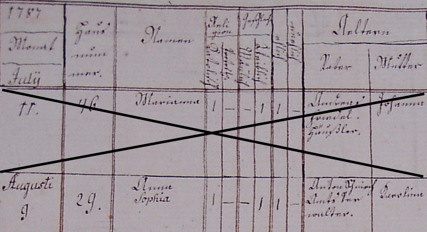 Geburt Anna Sophia Schnirch am 9 August 1787 in Deutsch Paulowittz